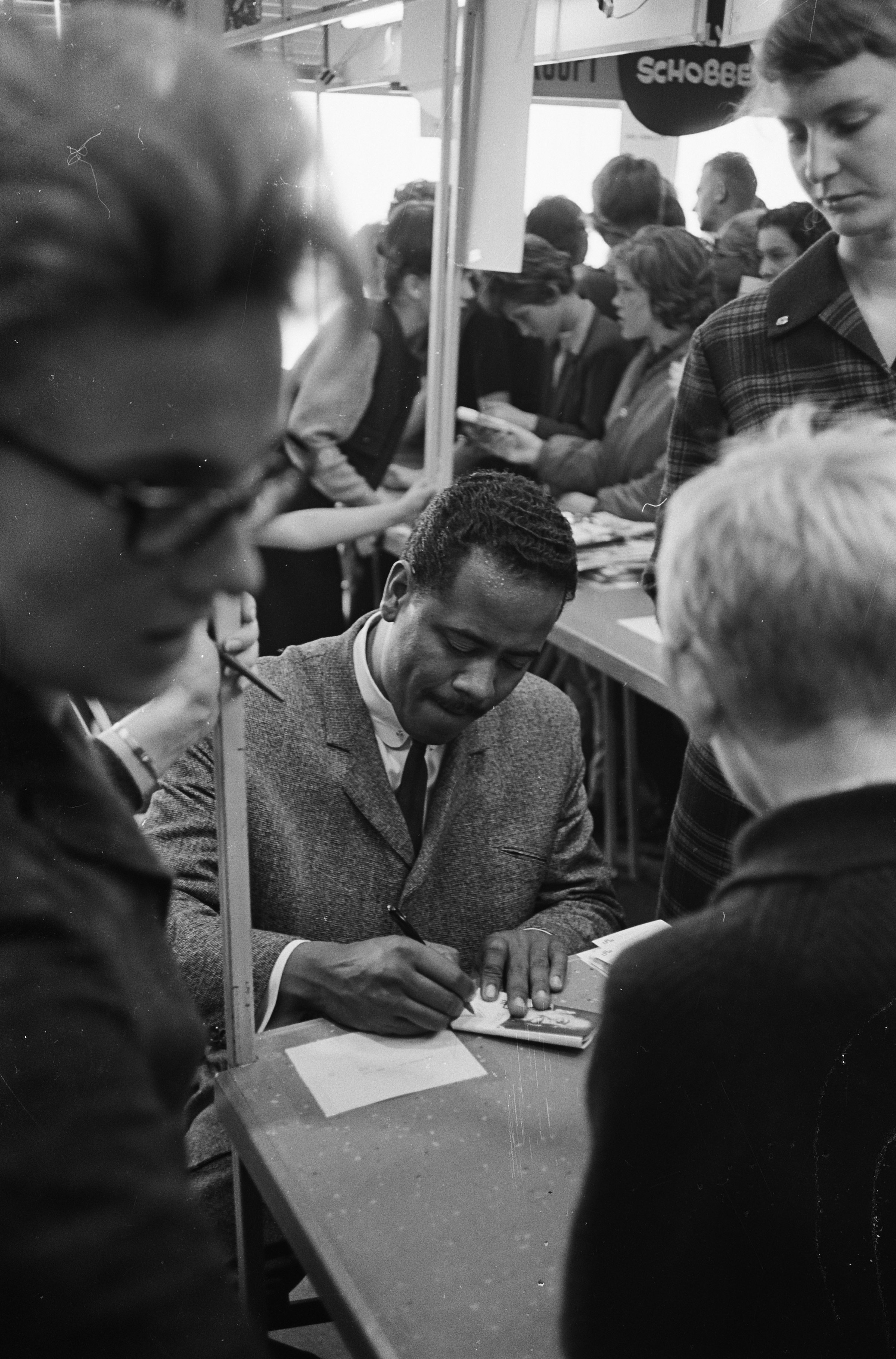 Collectie / Archief : Fotocollectie Anefo Reportage / Serie : [ onbekend ] Beschrijving : Platenmarkt in Bijenkorf te Rotterdam. Max Woisky deelt handtekeningen uit Datum : 10 oktober 1963 Locatie : Rotterdam, Zuid-Holland Trefwoorden : artiesten, grammofoonplaten, warenhuizen, winkels, zangers Persoonsnaam : Woisky Max Fotograaf : Walta, Winfried / Anefo Auteursrechthebbende : Nationaal Archief Materiaalsoort : Negatief (zwart/wit) Nummer archiefinventaris : bekijk toegang 2.24.01.05 Bestanddeelnummer : 915-6309 Reacties Geplaatst door Musicfan op 07 oktober 2015 - 20:14. de schrijfwijze is: Max Woiski jr.